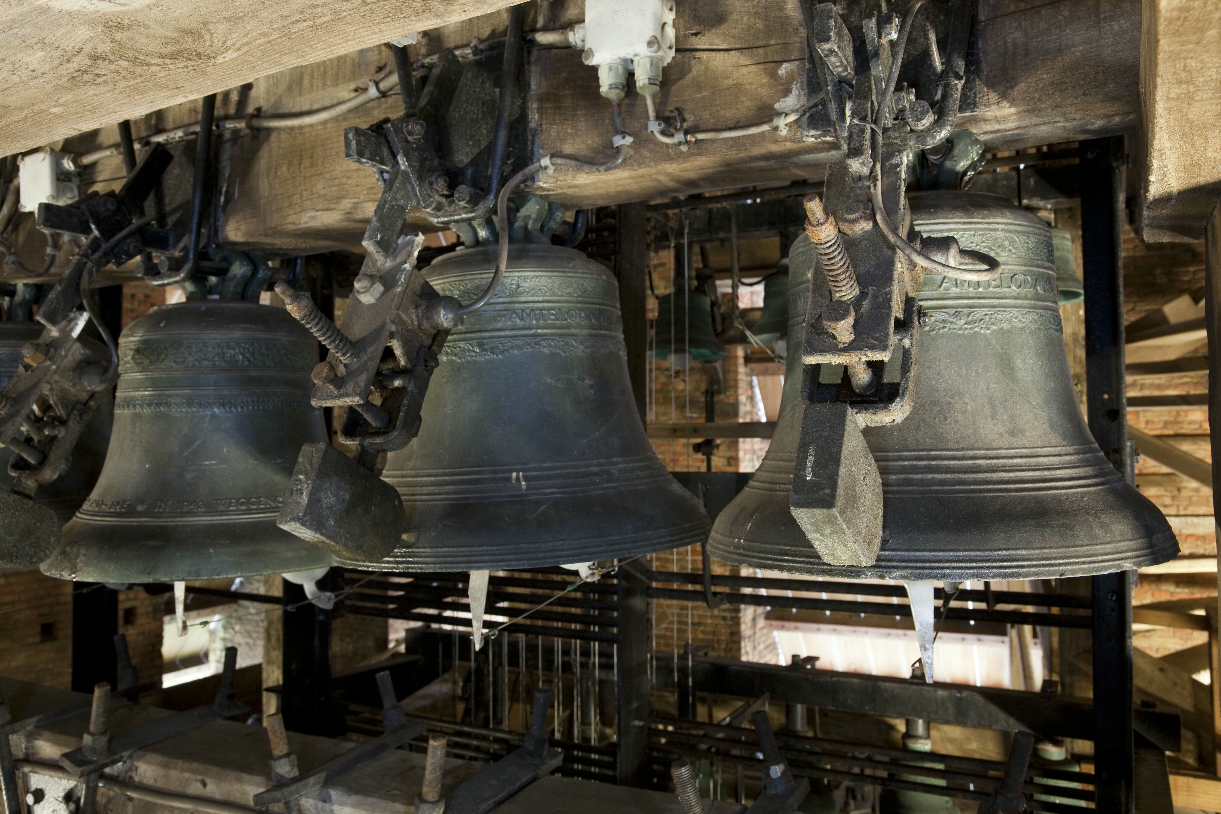 Grote of Sint Catharijnekerk: Interieur toren, detail van het carillon op de vierde verdieping